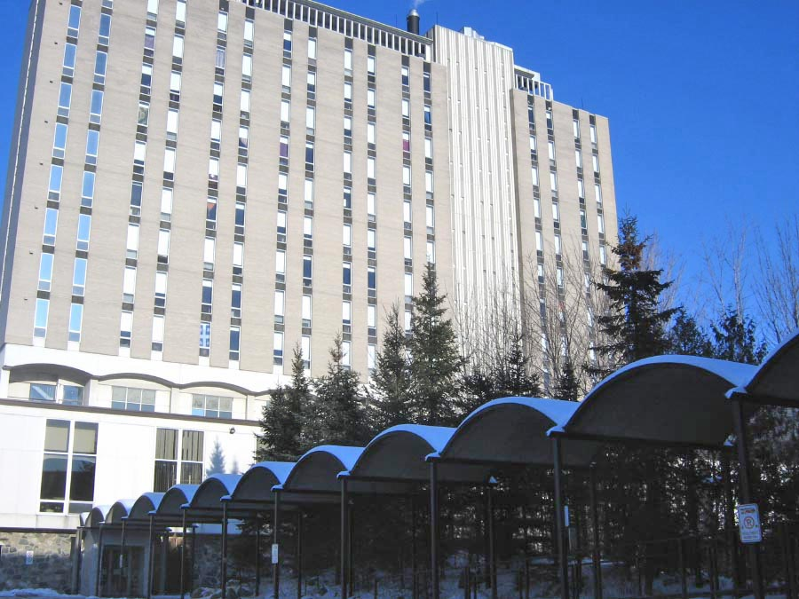 pavillon 6 cégep de sherbrooke